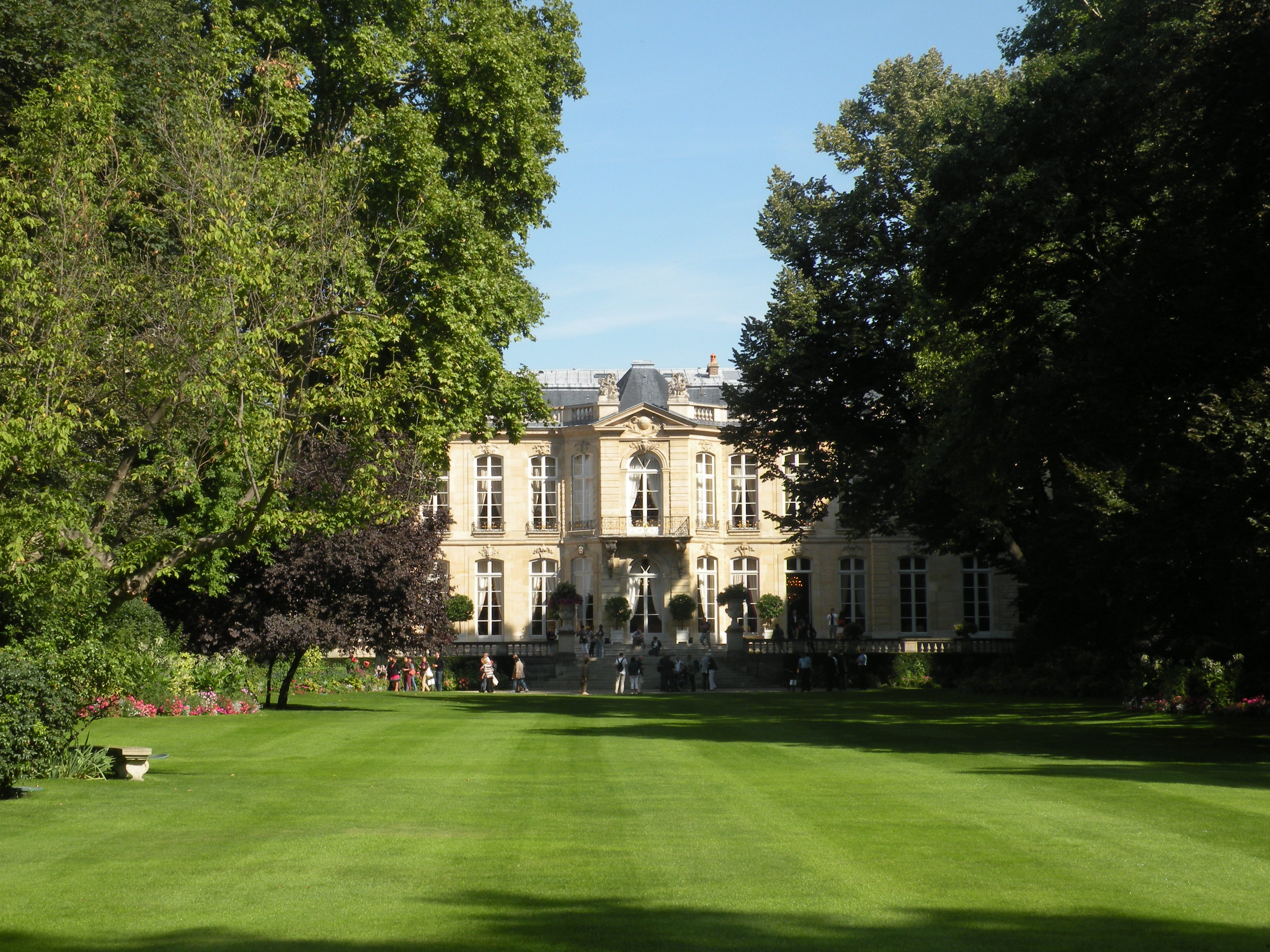 façade coté jardin de l'Hôtel Matignon